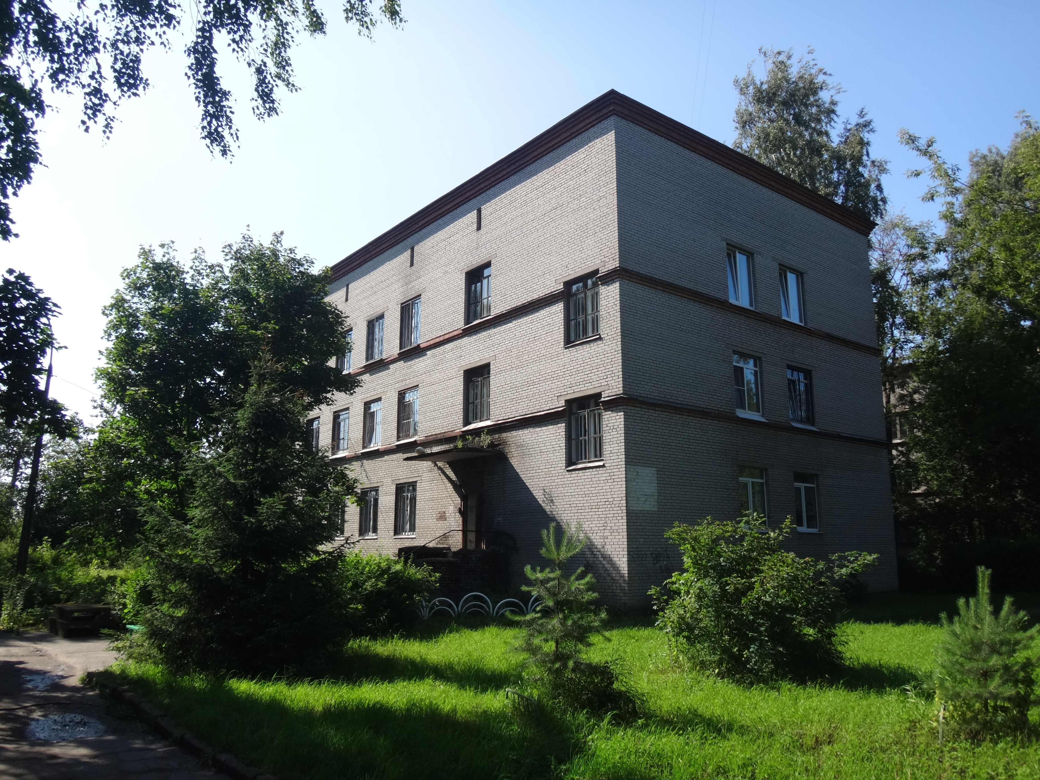 Типовое здание ГПБ № 3